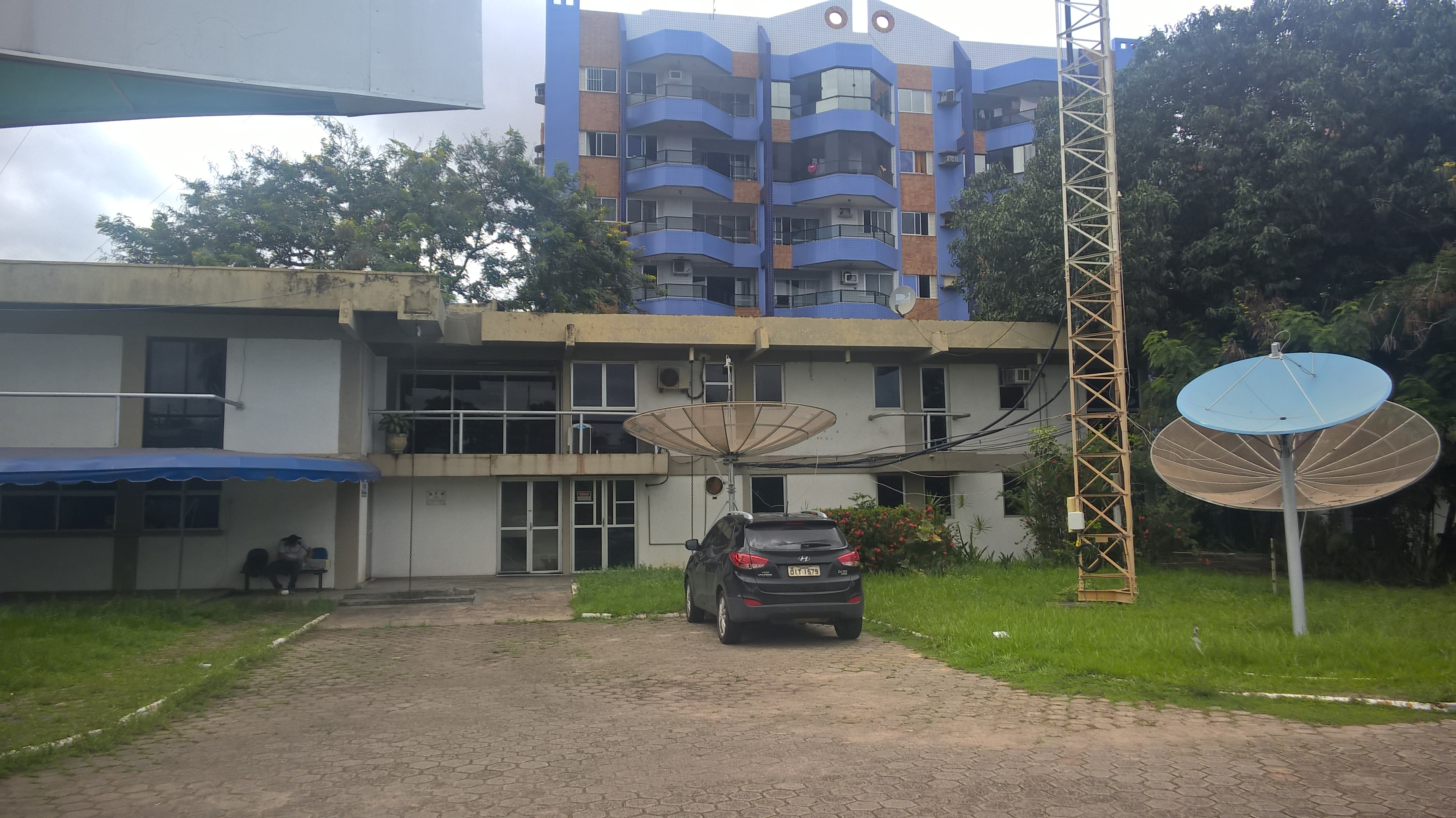 Fachada da sede da TV São Luís, emissora de televisão sediada em São Luís, MA - Brasil